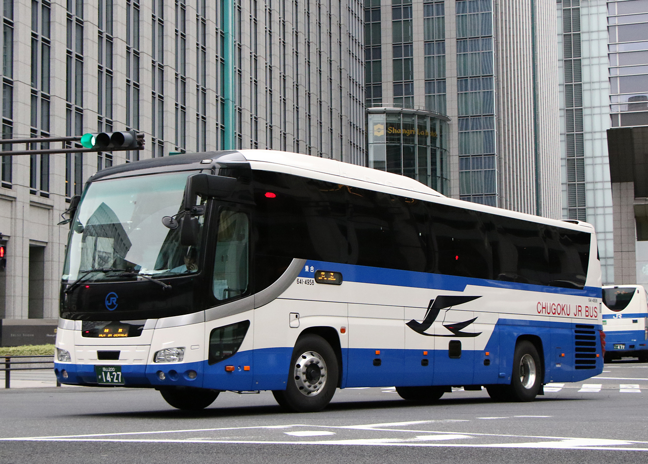 登録番号 岡山200か14-27 中国ジェイアールバス㈱岡山支店所属 夜行高速路線用車両 2016年10月30日 東京駅日本橋口にて撮影 撮影者 Zondag2000